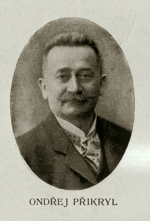 Ondřej Přikryl (1862 - 1936), Český lékař, básník a spisovatel.